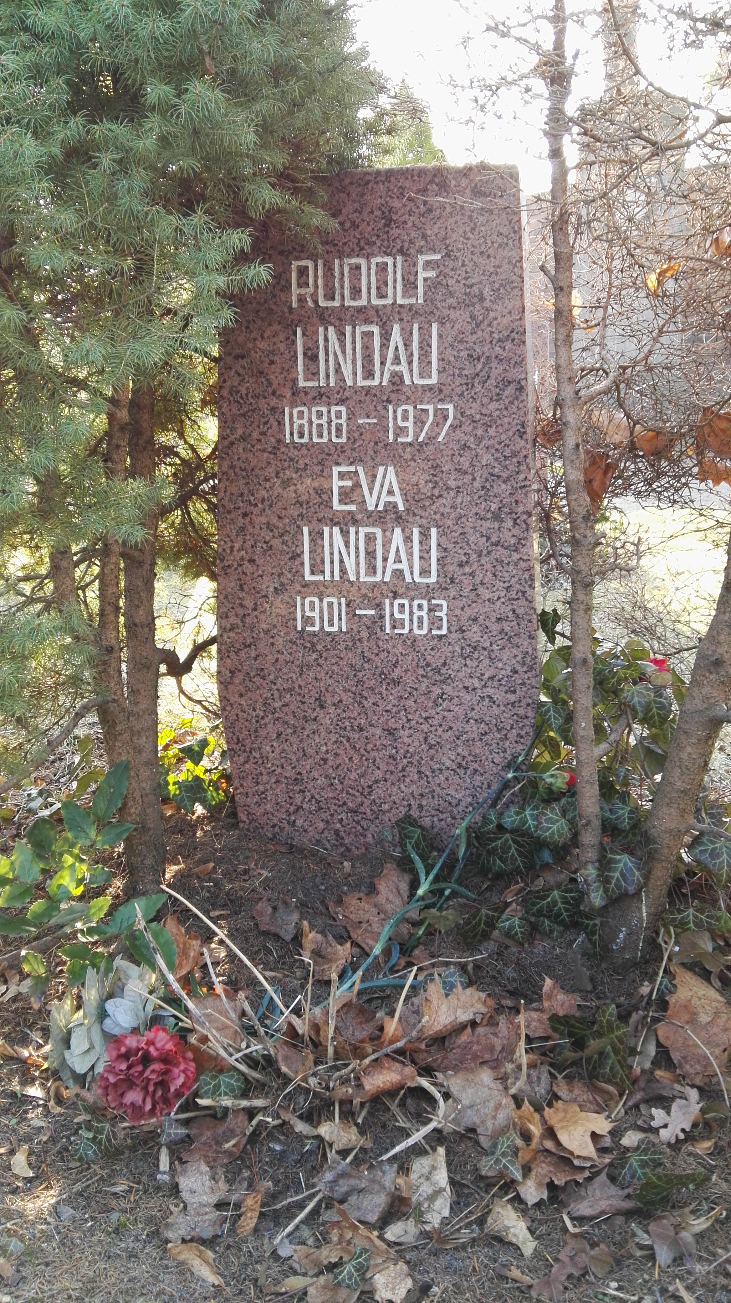 Grab von Rudolf Lindau und Eva Lindau in der Grabanlage Pergolenweg auf dem Sozialistenfriedhof des Zentralfriedhofs Friedrichsfelde